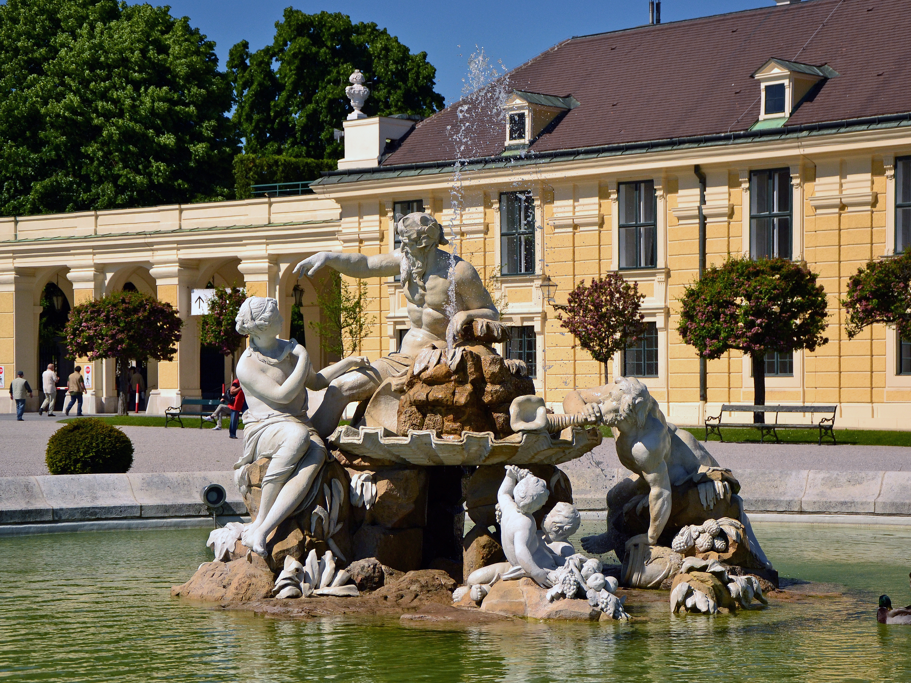 Zwei Zierbrunnen im Ehrenhof